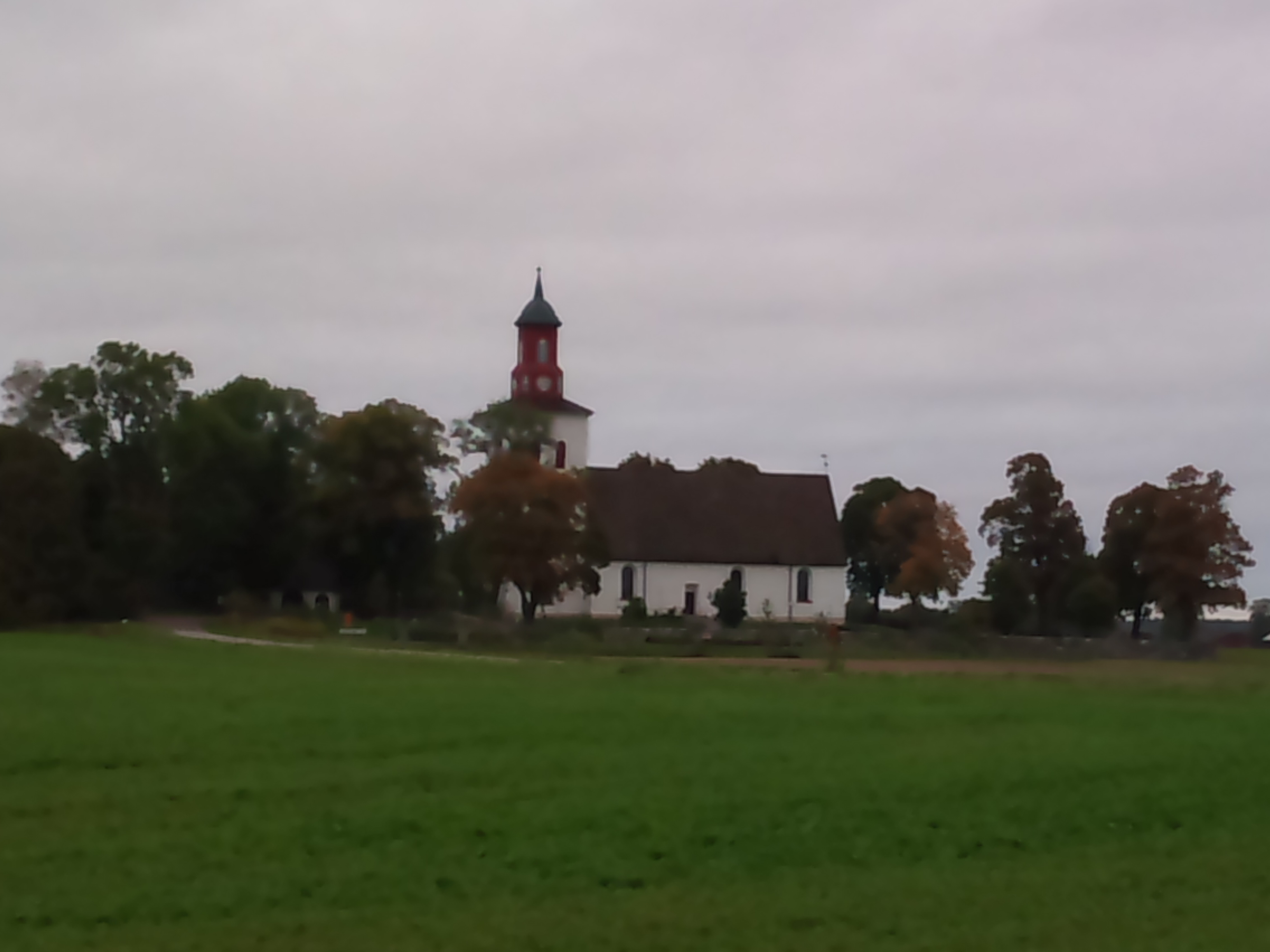 Skuttunge kyrka